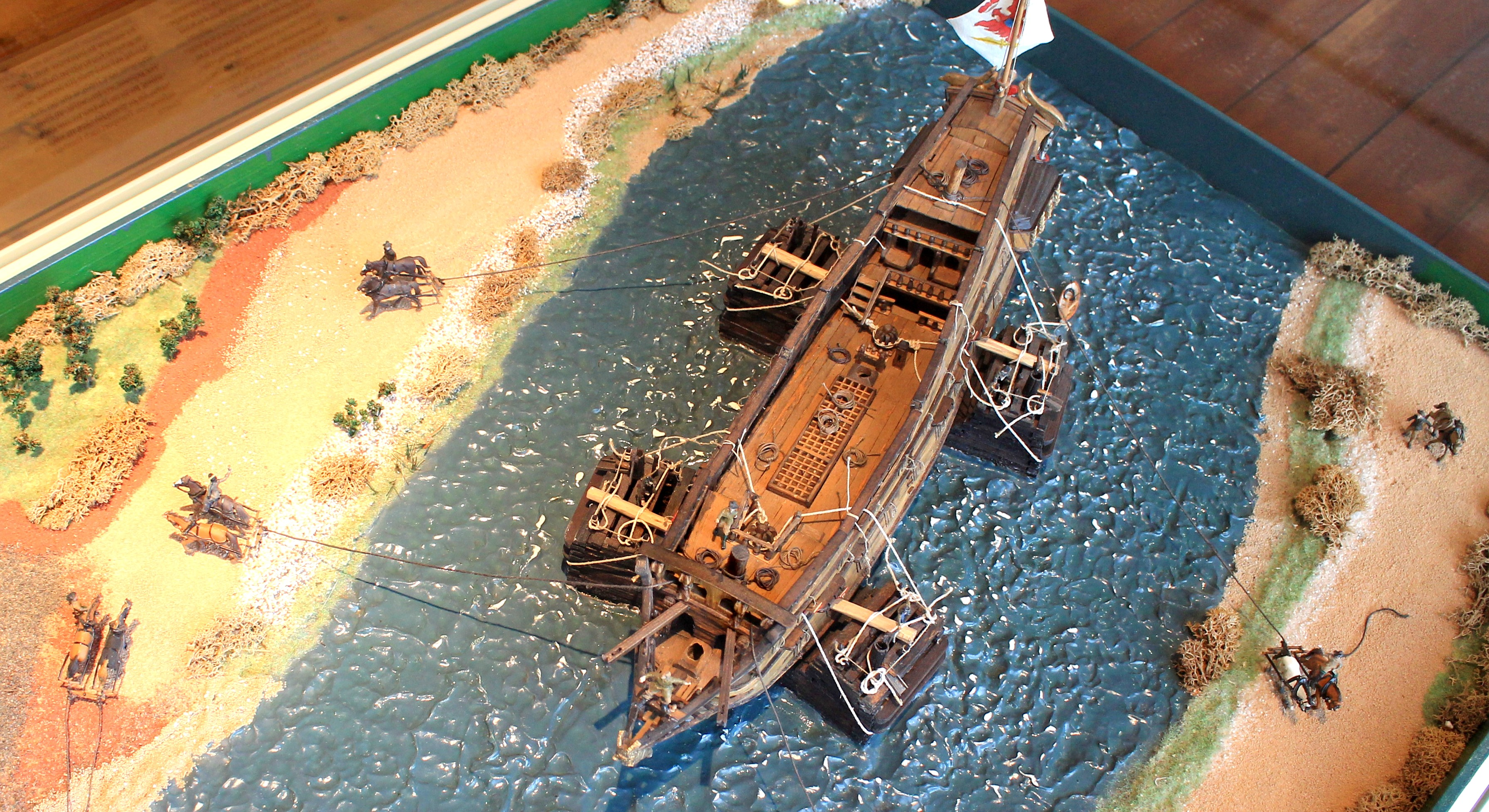 Modell zur Schiffsüberführung mit Hilfe von "Kamelen" von Havelberg nach Hamburg